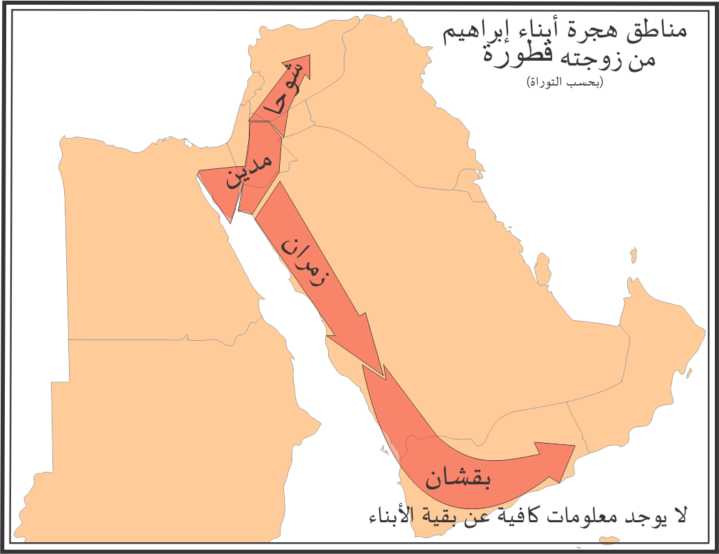 خريطة تمثل إنتشار ذرية إبراهيم بحسب الأبحاث الأكاديمية المعتمدة على التوراة وتارخ المؤرخ يوسيفوس اليهودي.